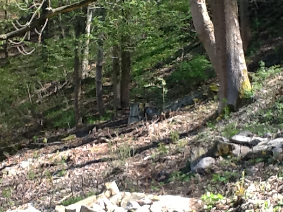 Zbývající základy bývalé železnice Kyselka 2014